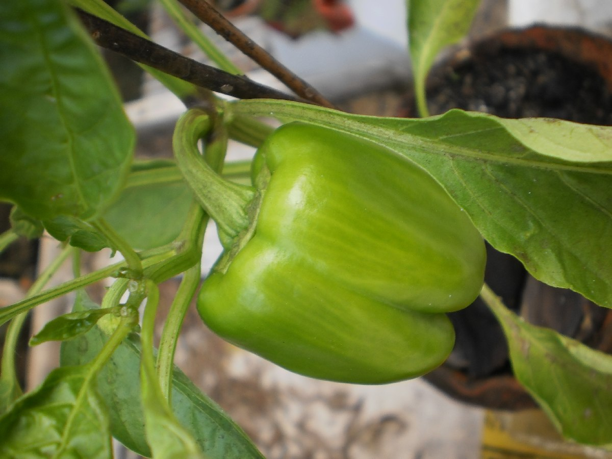 കാപ്സിക്കം മുളക്